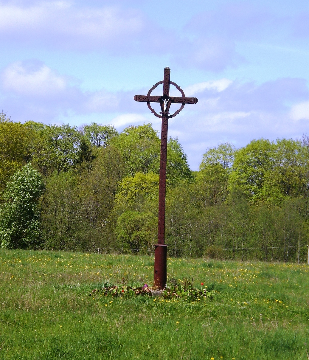 Kryžius, Švenybrastis, Kėdainių raj.